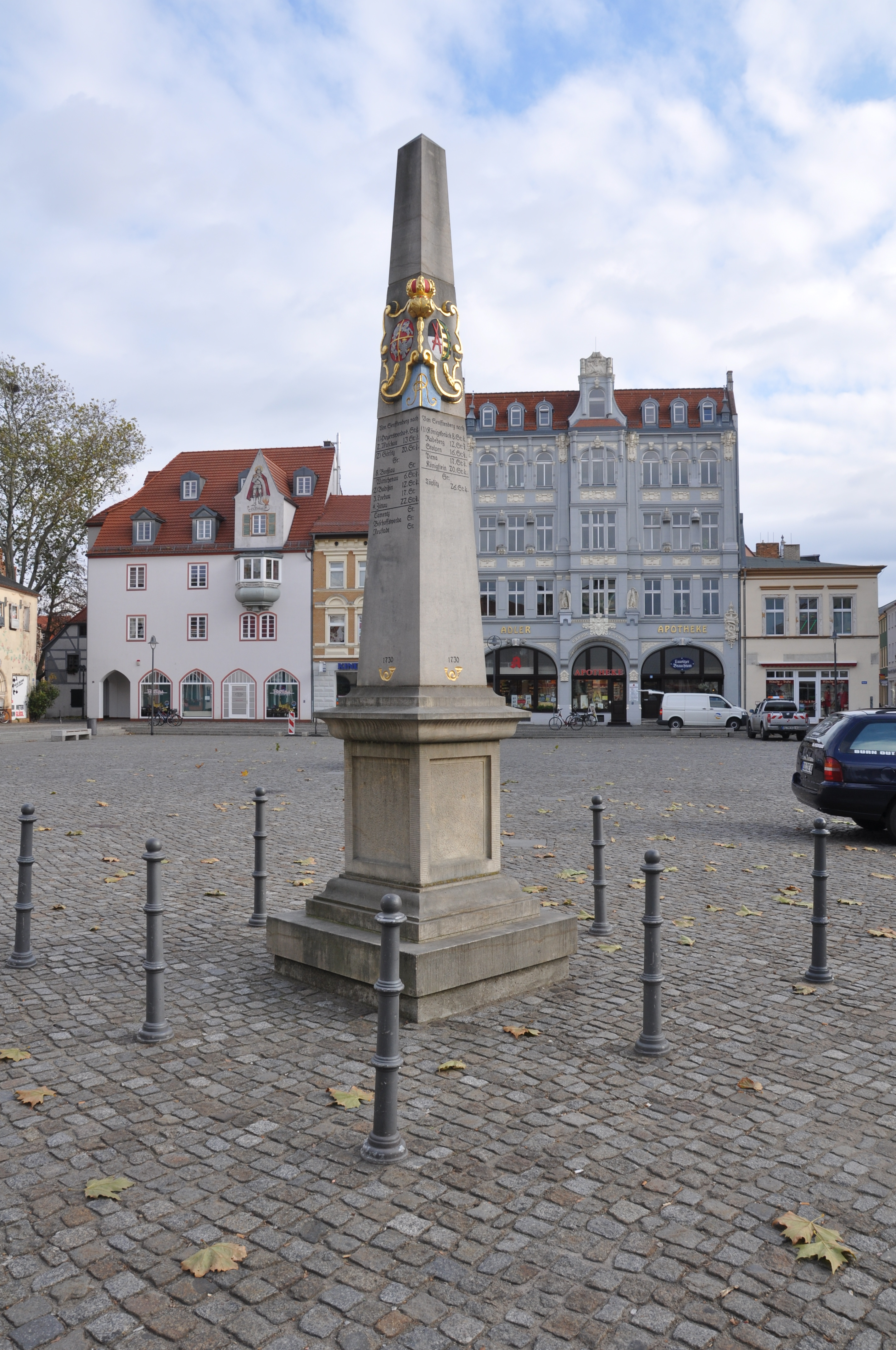 Senftenberg (Brandenburg), Markt, Sächsische Postmeilensäule